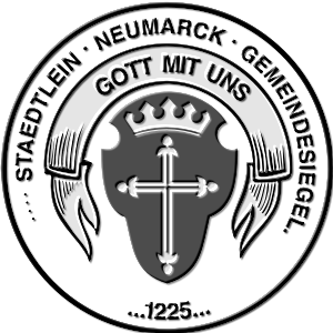 Siegel von Neumark (Vogtland), Sachsen